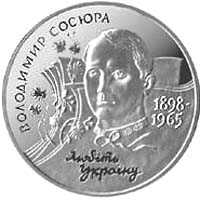 Пам'ятна монета рисвячена 100-річчю від дня народження Володимира Сосюри